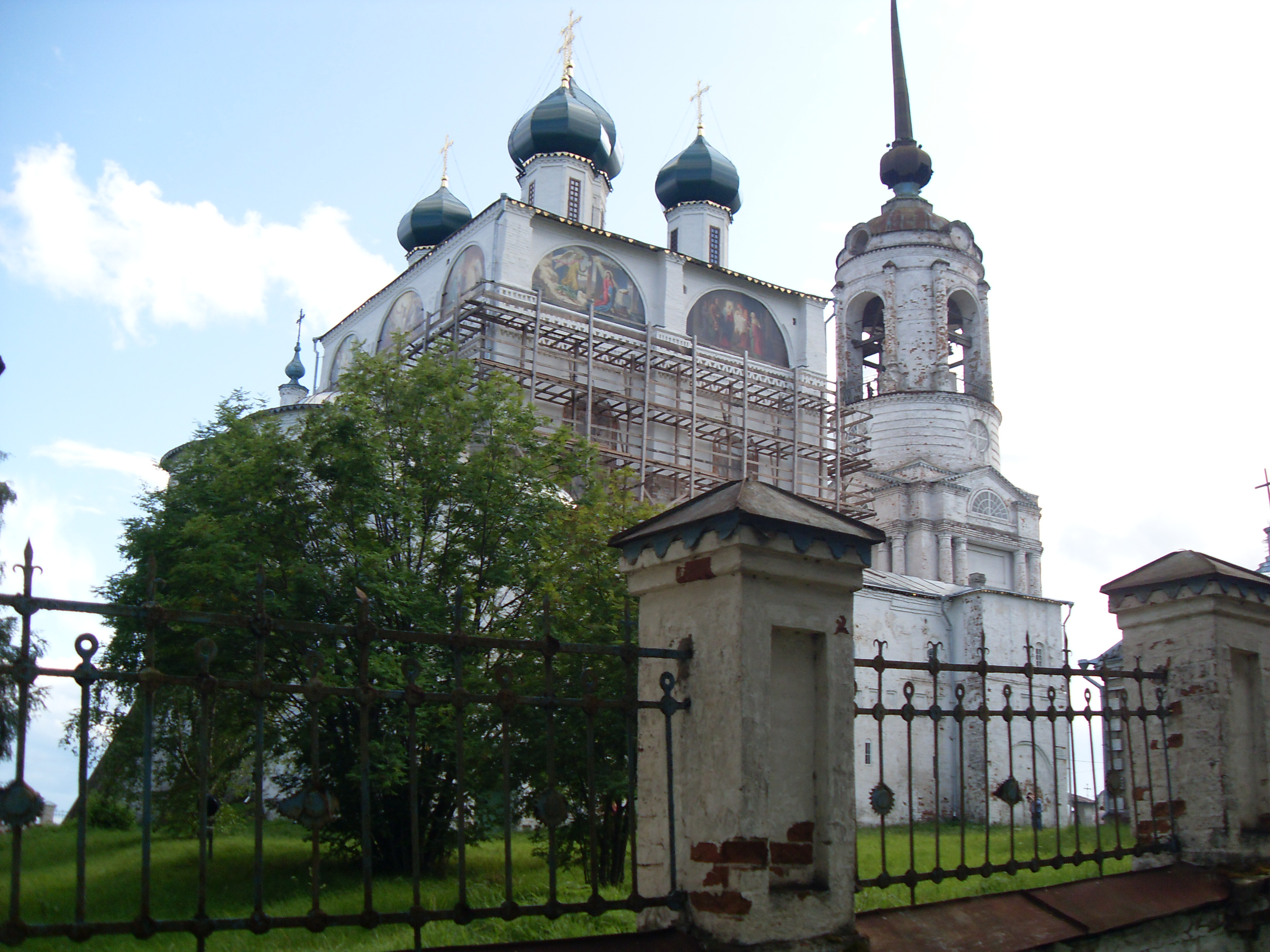 Благовещенский собор г.Сольвычегодск